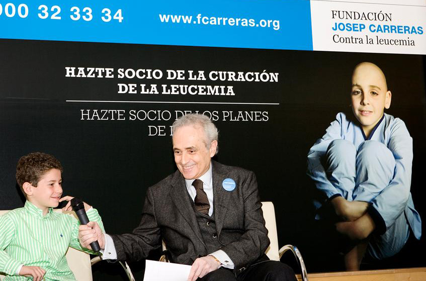 Josep Carreras con Antonio, ex-paciente de leucemia, durante la presentación de la campaña de sensibilización 2009 Cuéntanos tu plan